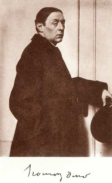 Szomory Dezső